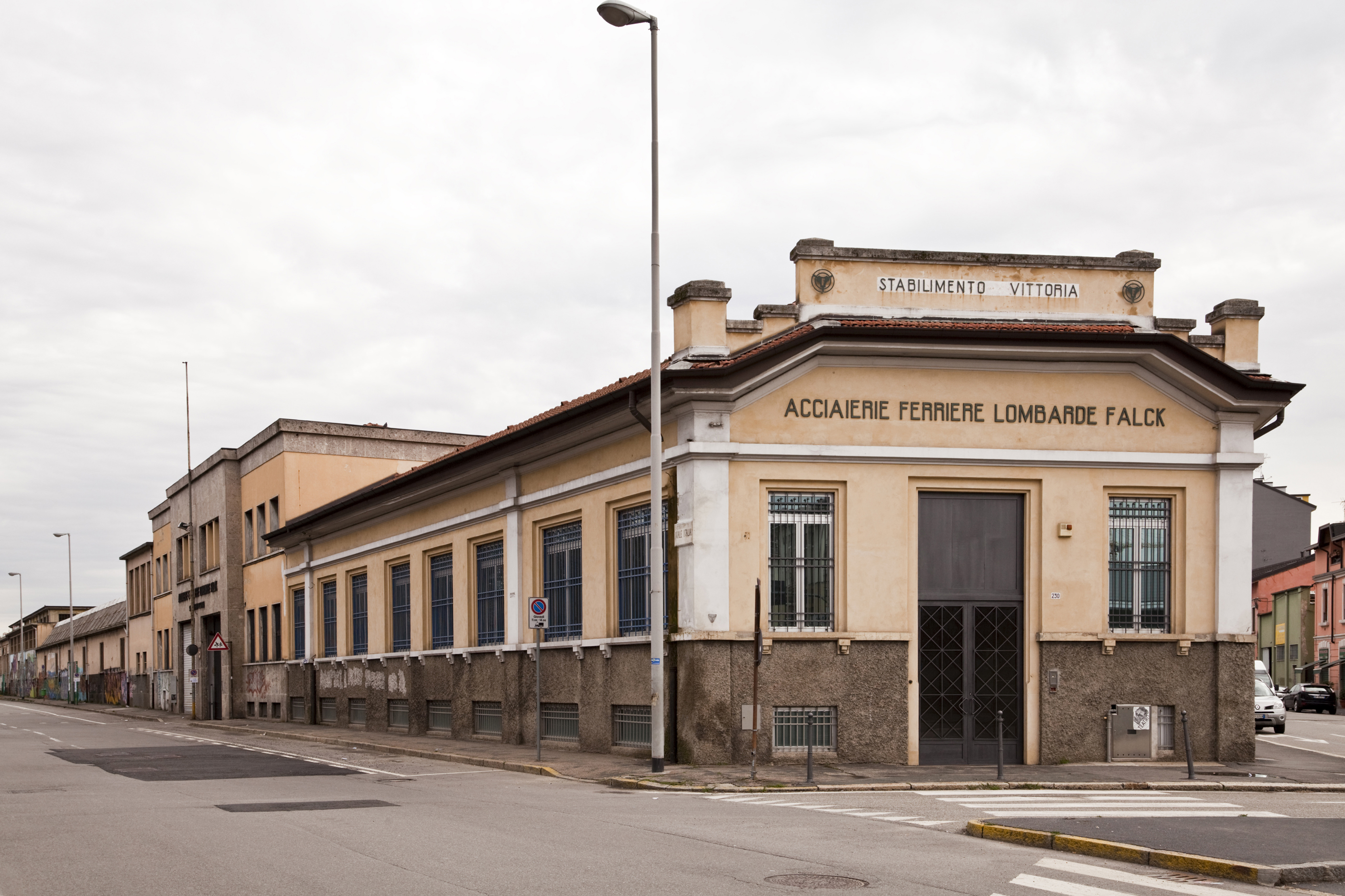 Portineria del reparto laminatoio a freddo delle acciaierie falck situato nel comune di Sesto S. Giovanni This is a photo of a monument which is part of cultural heritage of Italy.